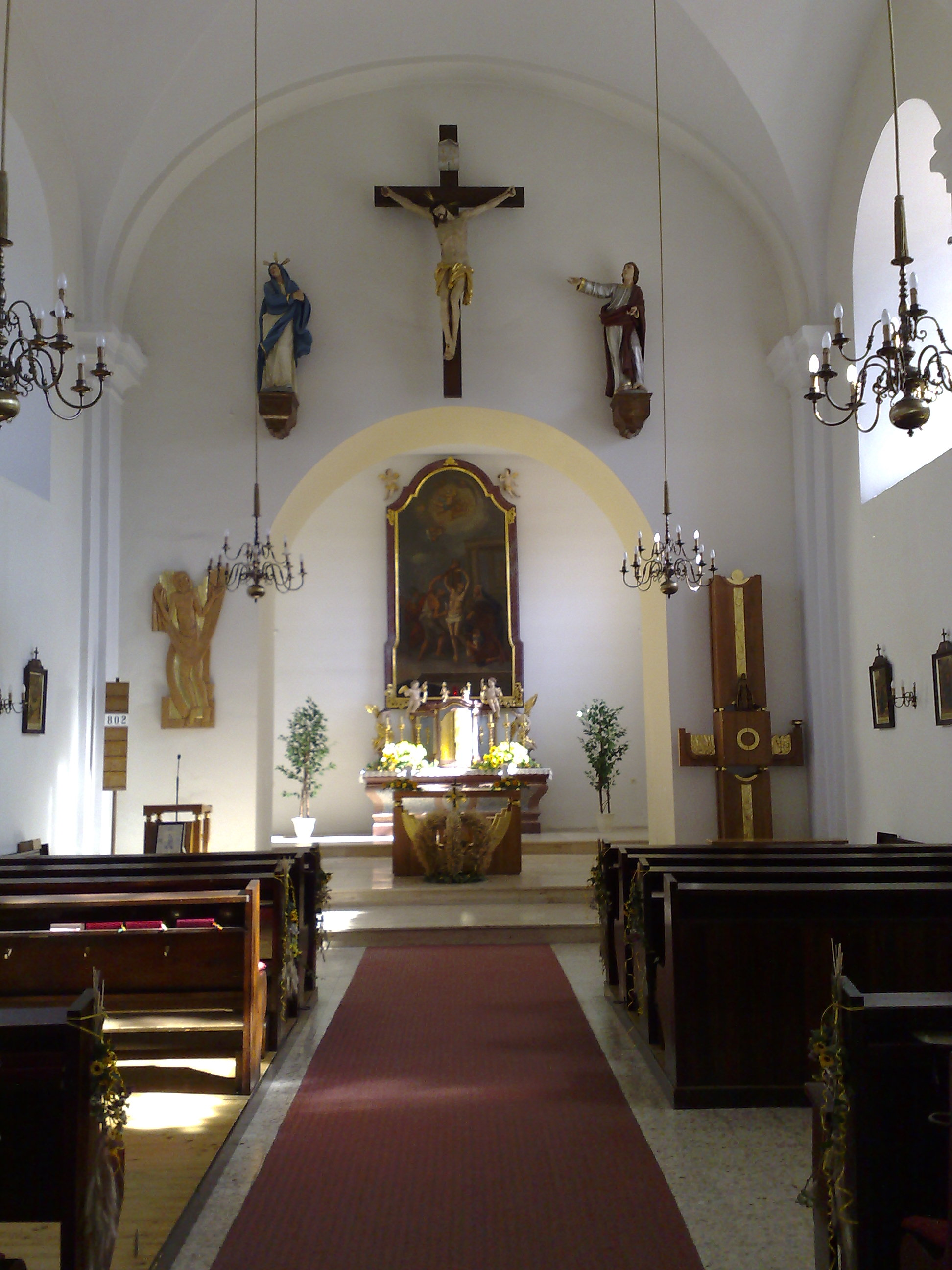 Innenansicht der römisch-katholische Pfarrkirche zu Sankt Bartholomäus von Schwarzenbach